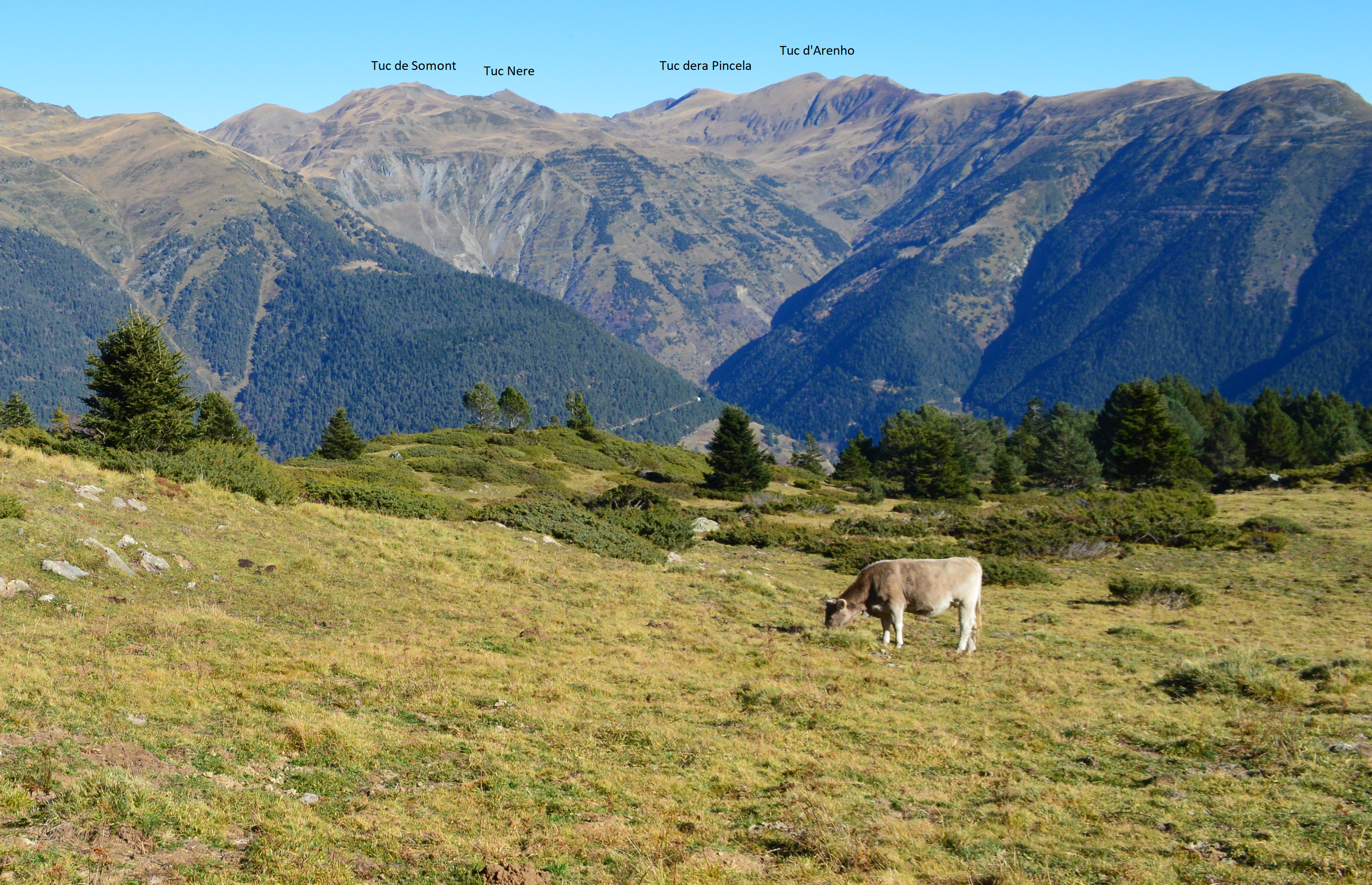 Tuc d'Arenho, Tuc dera Pincela, Tuc Nere e Tuc de Somont